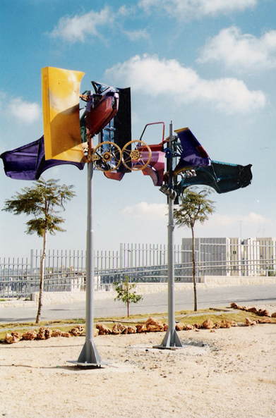 מתכת ממוחזרת, בית ספר יסודי, ירושלים